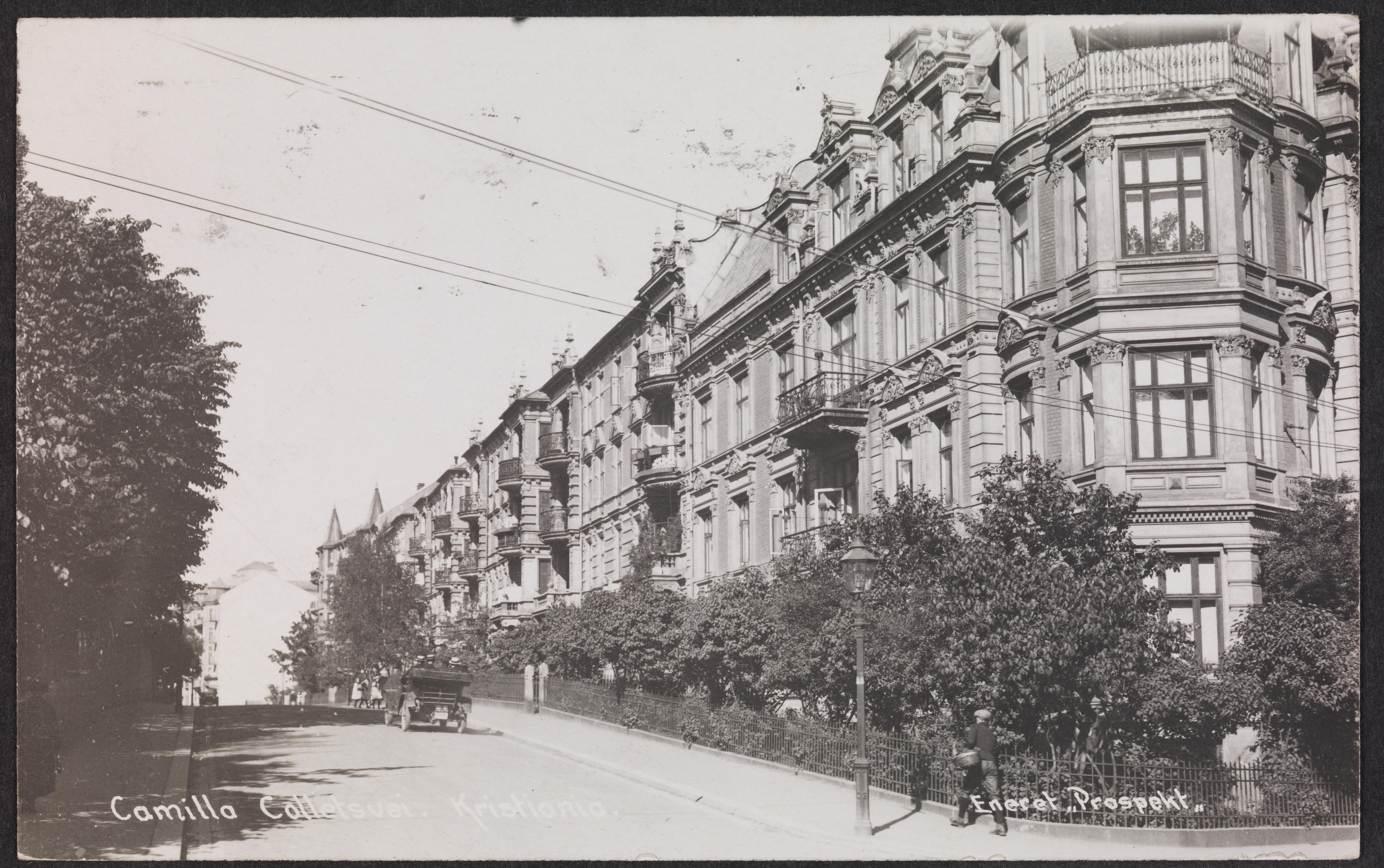 Bildet er hentet fra Nasjonalbibliotekets bildesamling Camilla Colletts vei,Frogner,Uranienborg, Oslo, Oslo